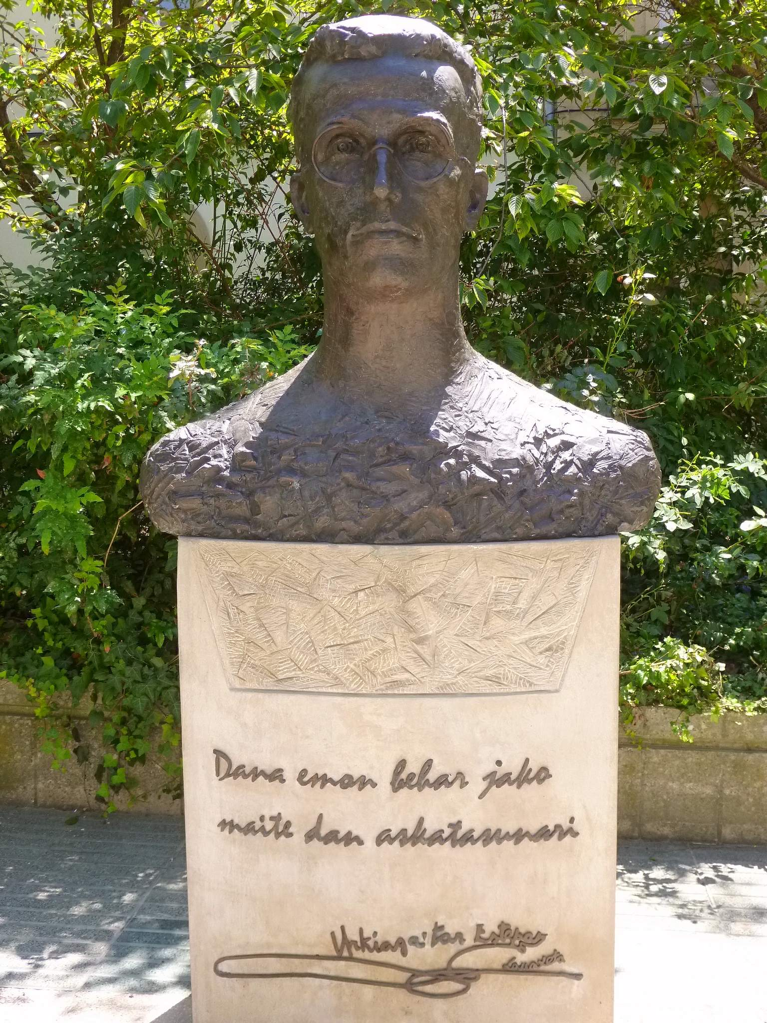 Vitoria - Monumento al poeta Lauaxeta